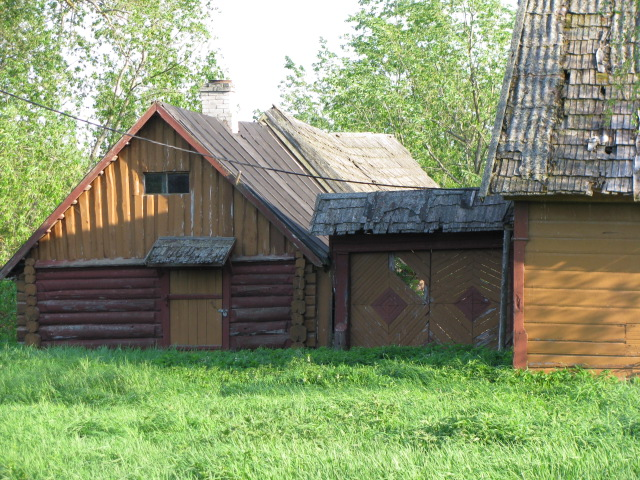 Kalurimaja Piirissaarel, Piiri külas